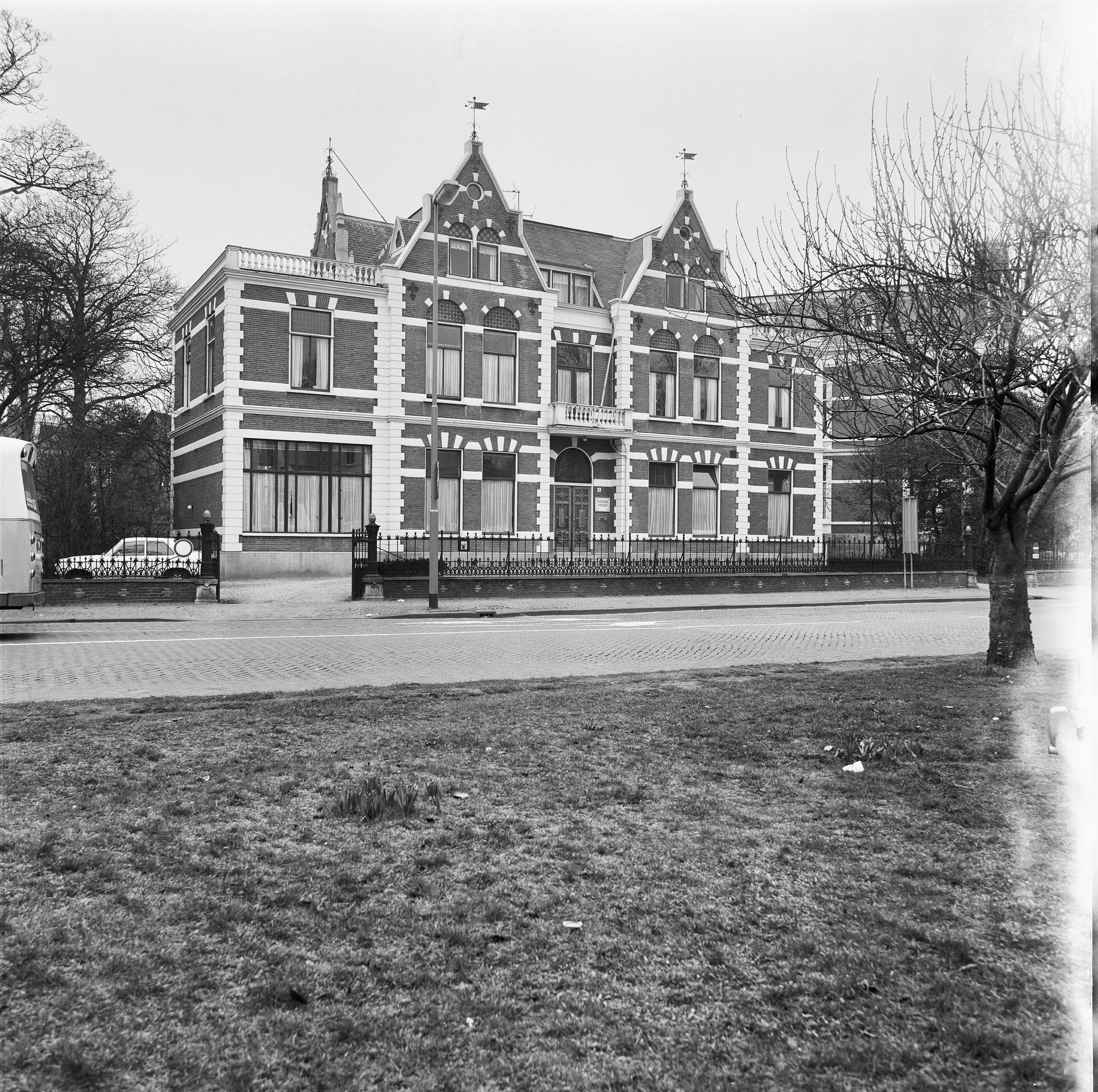 exterieur voorgevel